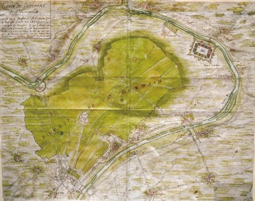 Carte du XVIIe montrant la position du fort Saint-Sébastien, fort d'entrainement des troupes de Louis XIV au nord de la forêt de Saint-Germain